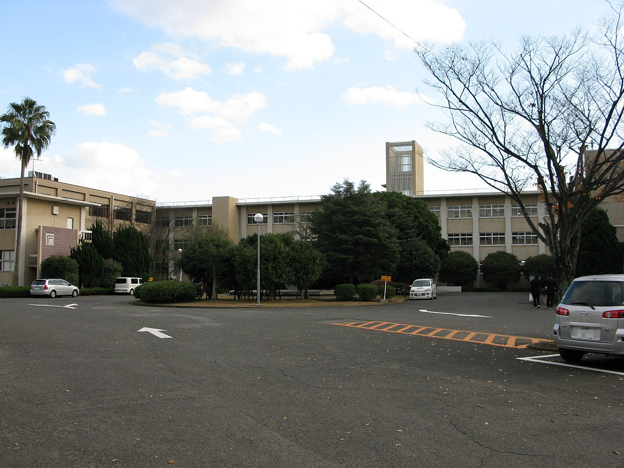 佐世保工業高等専門学校（佐世保高専）校舎